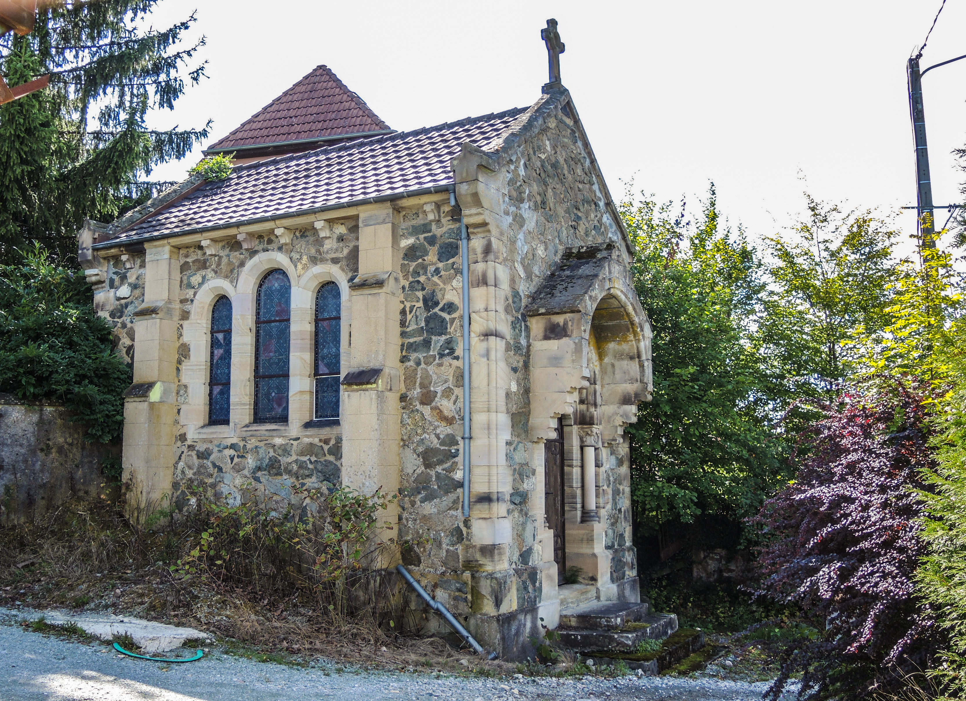 Chapelle Grisey. Lachapelle-sous-Rougemont. Territoire de Belfort